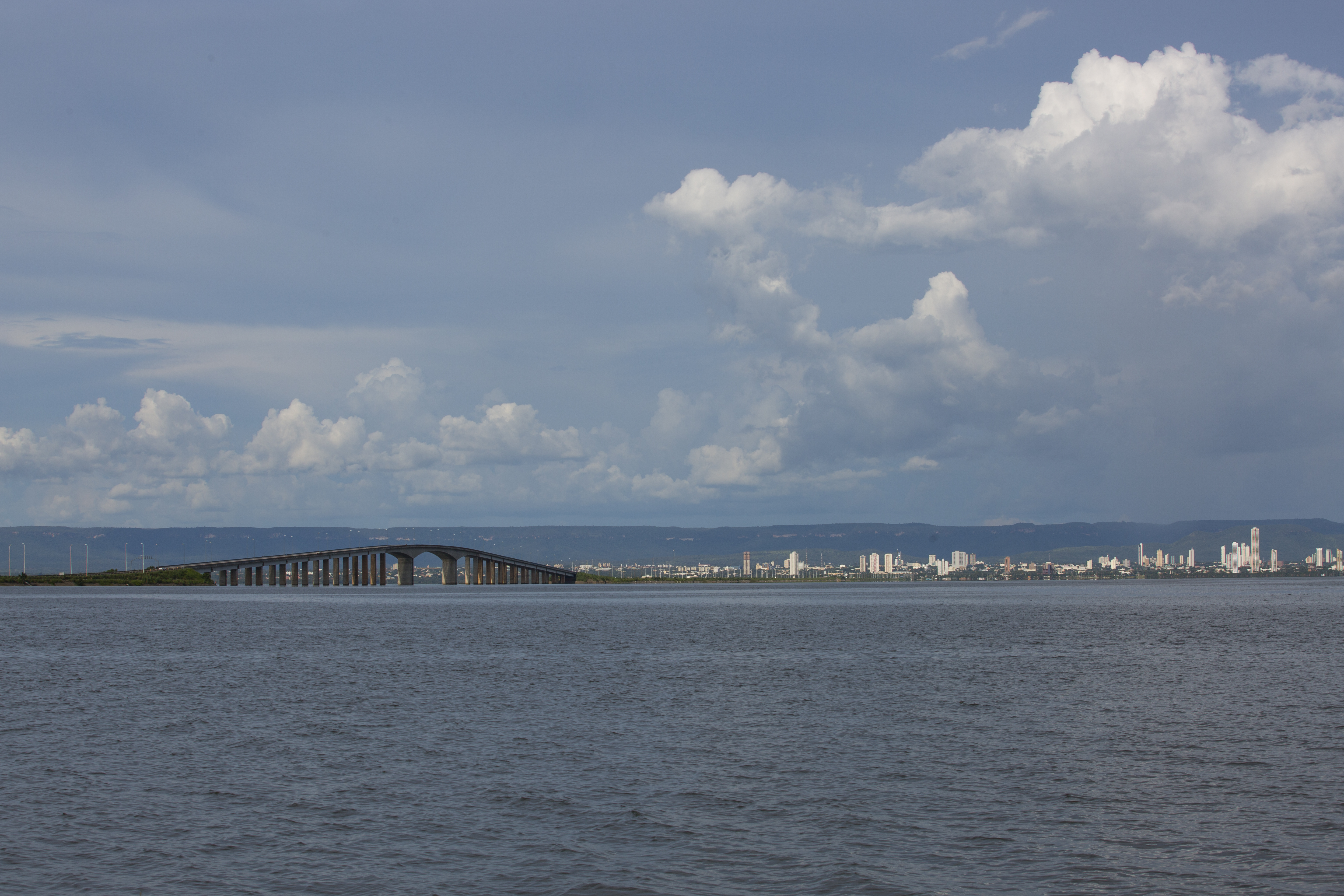 Crédito obrigatório: Flávio André - MTUR